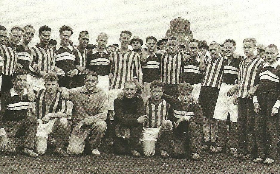 LPM-Heinolan Isku